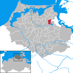 Pantelitz in Mecklenburg-Vorpommern - District Nordvorpommern